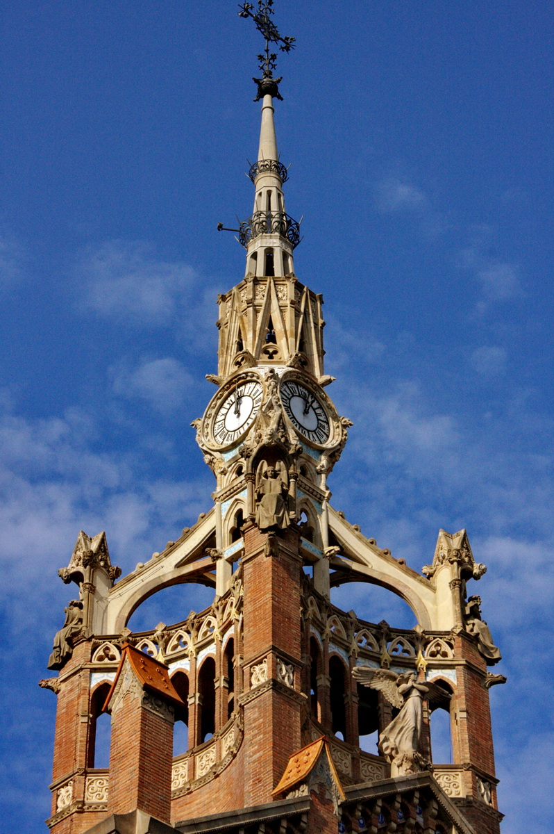 Torre del rellotge a l'edifici d'administració (detall) de l'Hospital de Sant Pau (Barcelona, Catalunya) (1902-1911)